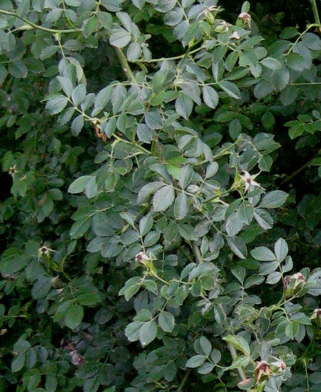 Rosa elliptica